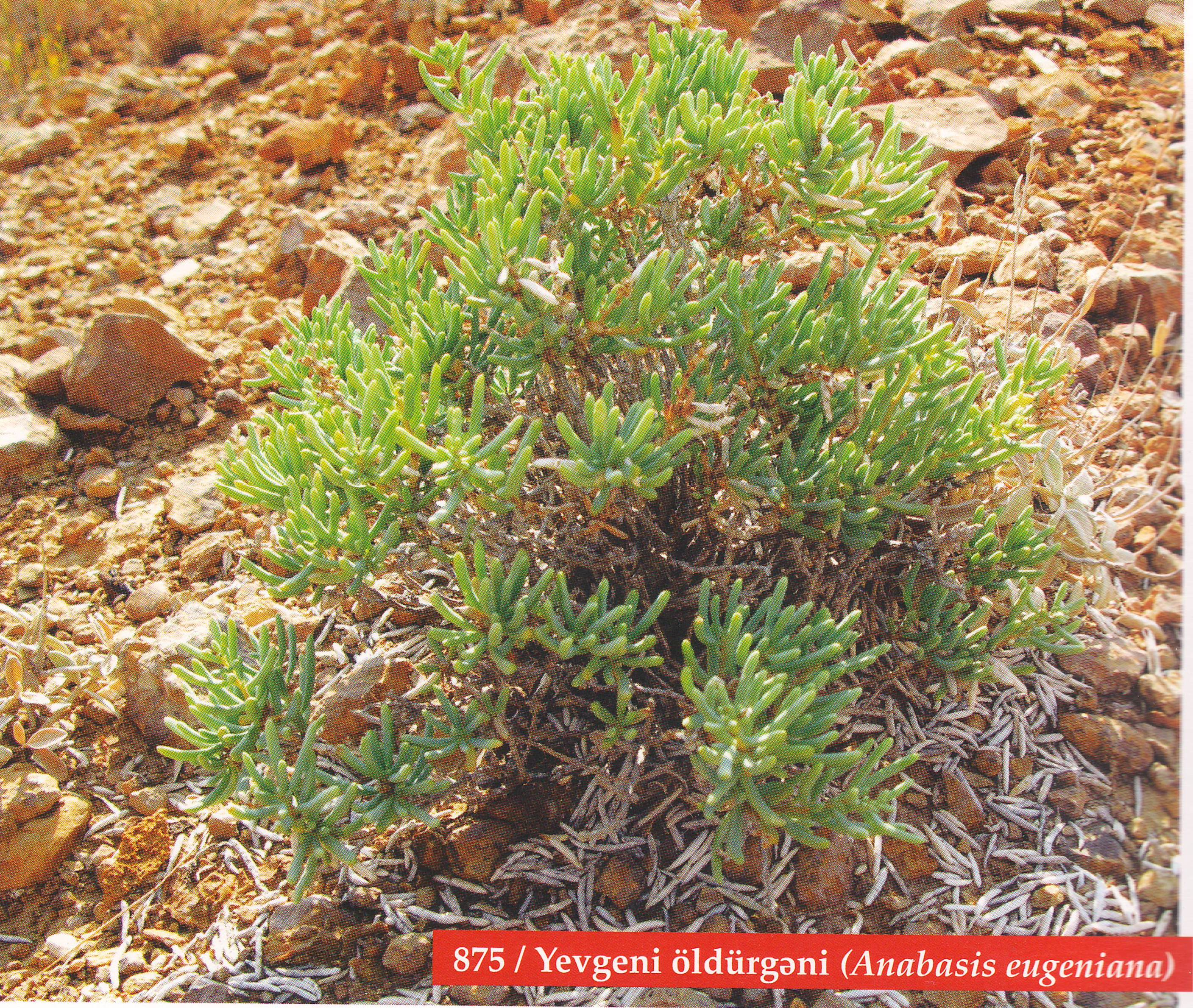 Babək rayonu. Yevgeni öldürgəni